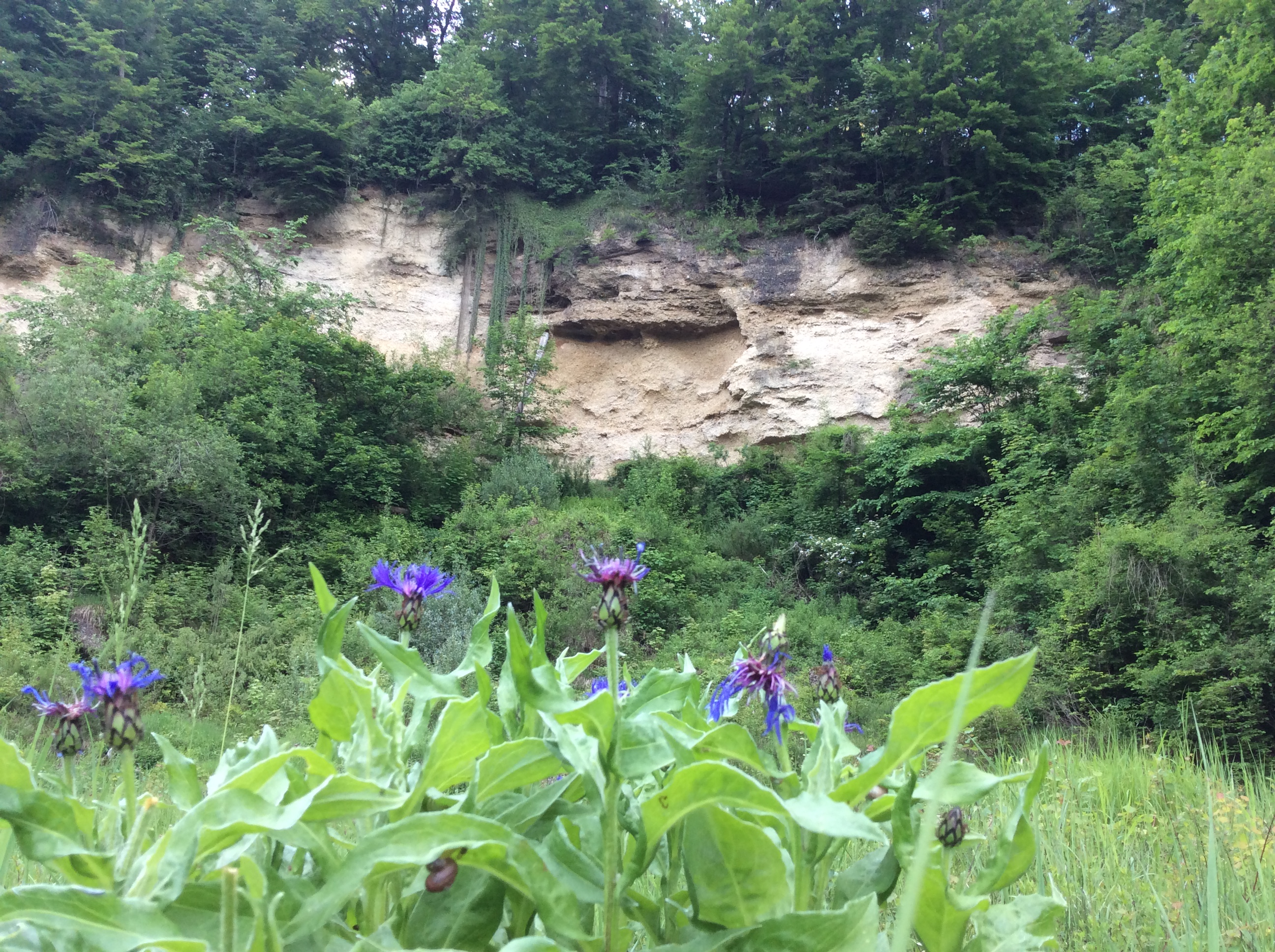 Aufschluss eiszeitlicher Schotterablagerungen, entstanden durch Hangrutsch 1979, Baierbrunn im Isartal, Geotop 184A002